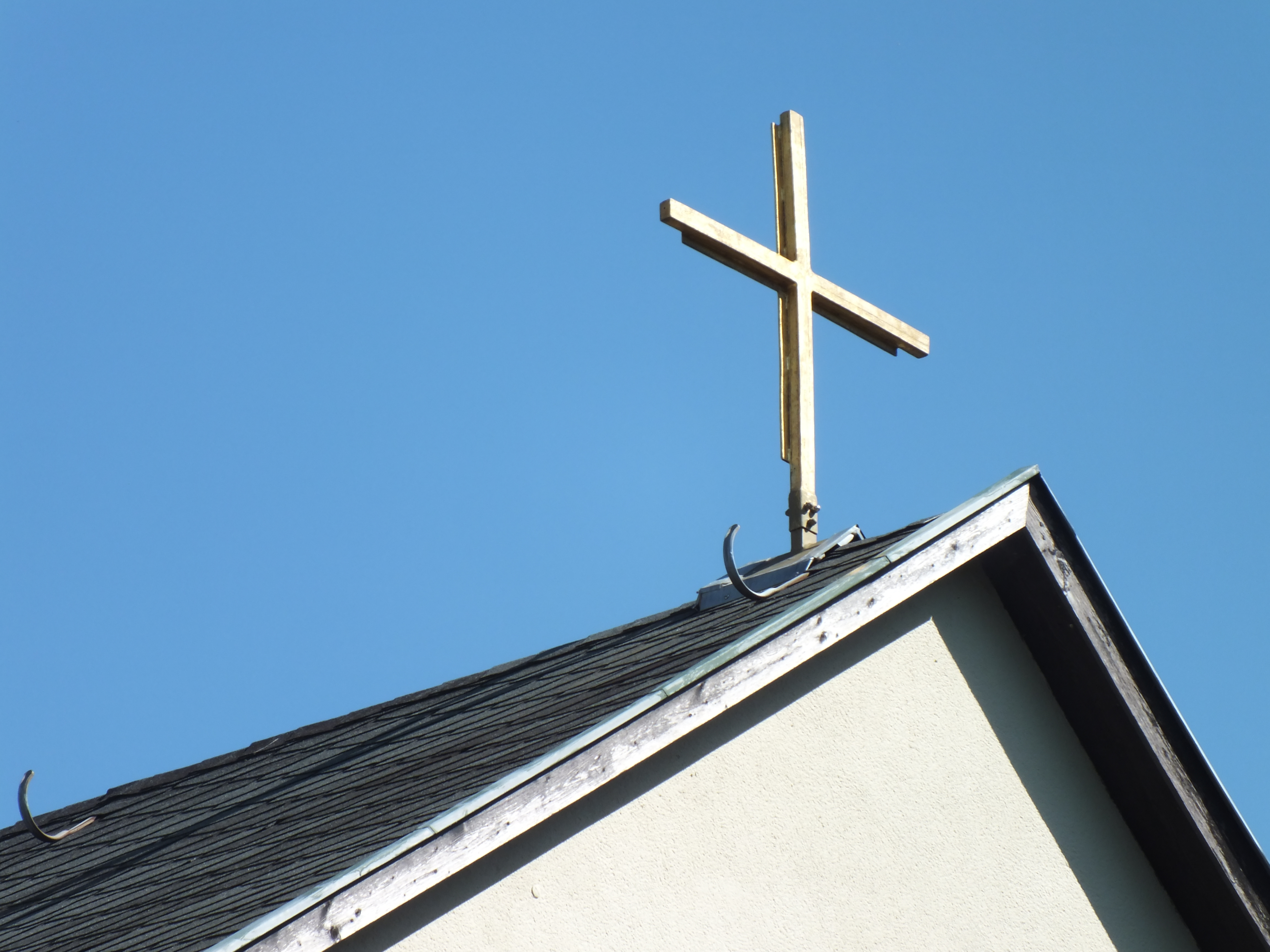 Berlin-Friedrichshagen: katholische Kapelle St. Franziskus, Ansicht von Nordwest